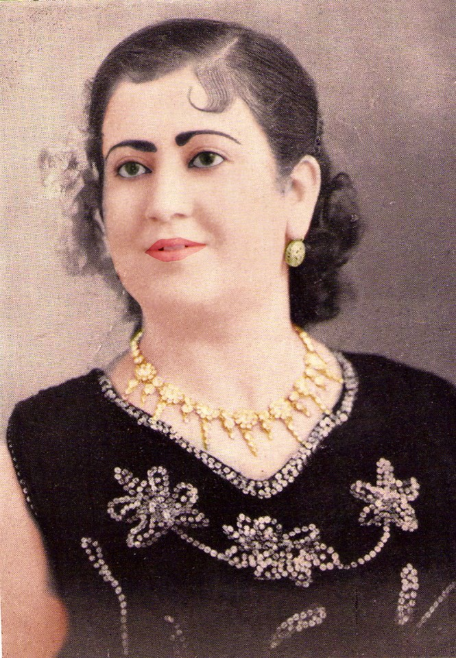 Fadela Dziria en couleur. Avec un collier en OR, elle le vaut bien. Espérant que ça plaise. Contribution de Mr. Jalal Aït Kara